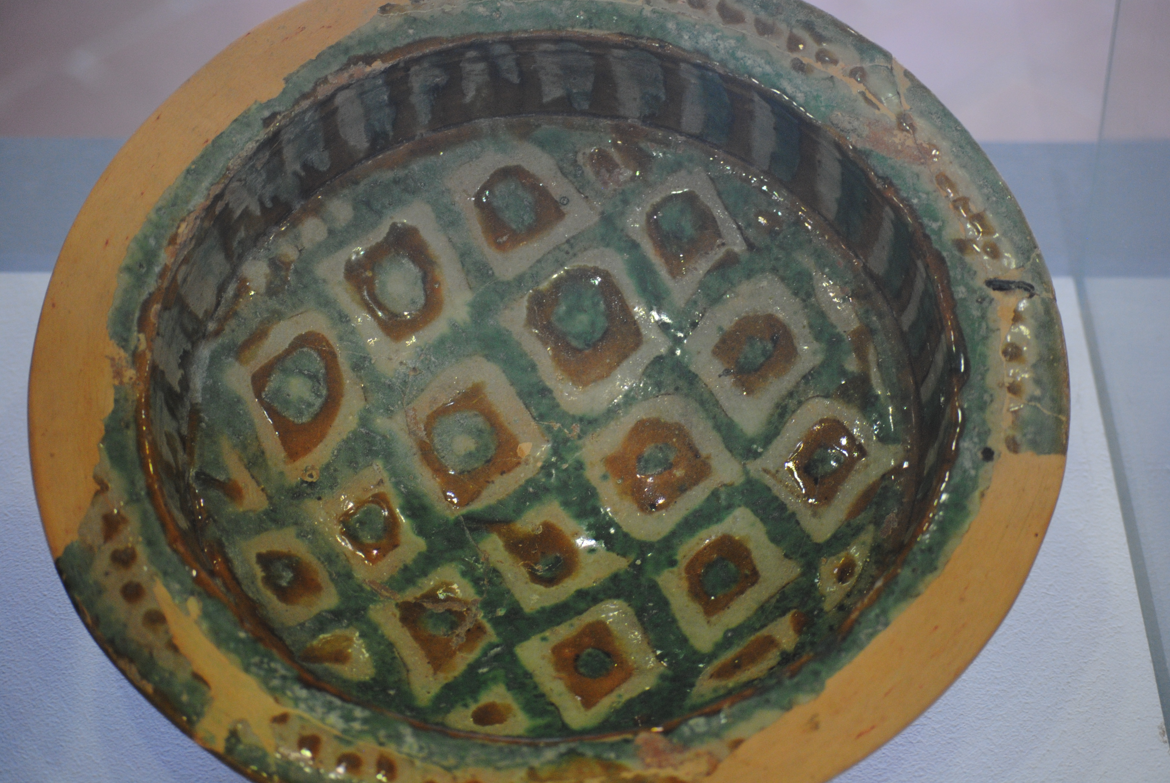 Scodella in maiolica decorata a cuerda seca e usata come bacino ceramico - importata dalla Spagna meridionale (al-Andalus) alla fine del X secolo (chiesa di San Piero a Grado, Pisa) - Museo nazionale di San Matteo.